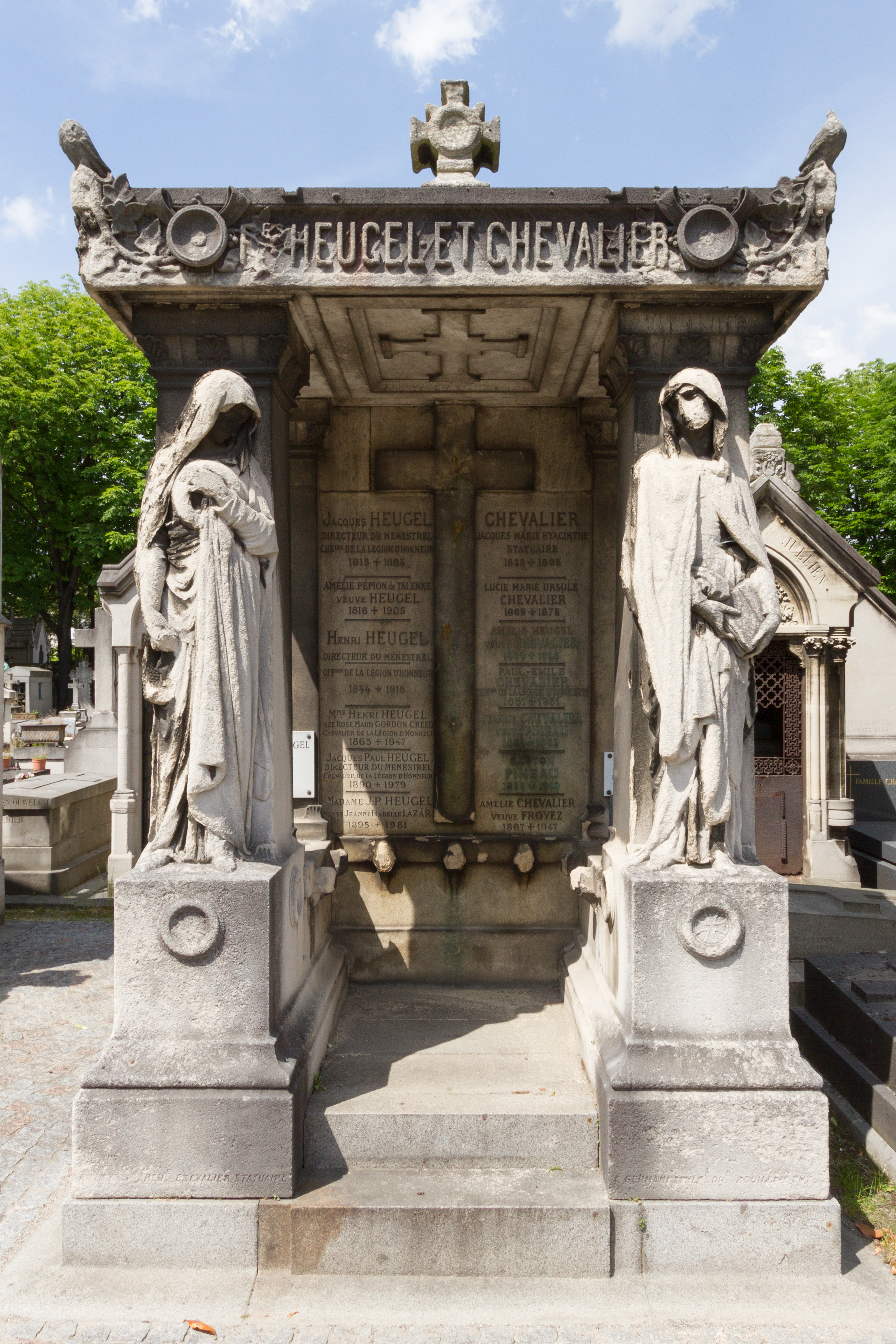 Sépulture de Jacques-Hyacinthe Chevalier (1825-1895), statuaire ; et de la famille Heugel, éditeurs de musique : Jacques-Léopold Heugel (1815-1883), Henri Heugel (1844-1916), Paul-Émile Chevalier (1861-1931), Jacques Heugel (1890-1979), Philippe Heugel (1924-1991).